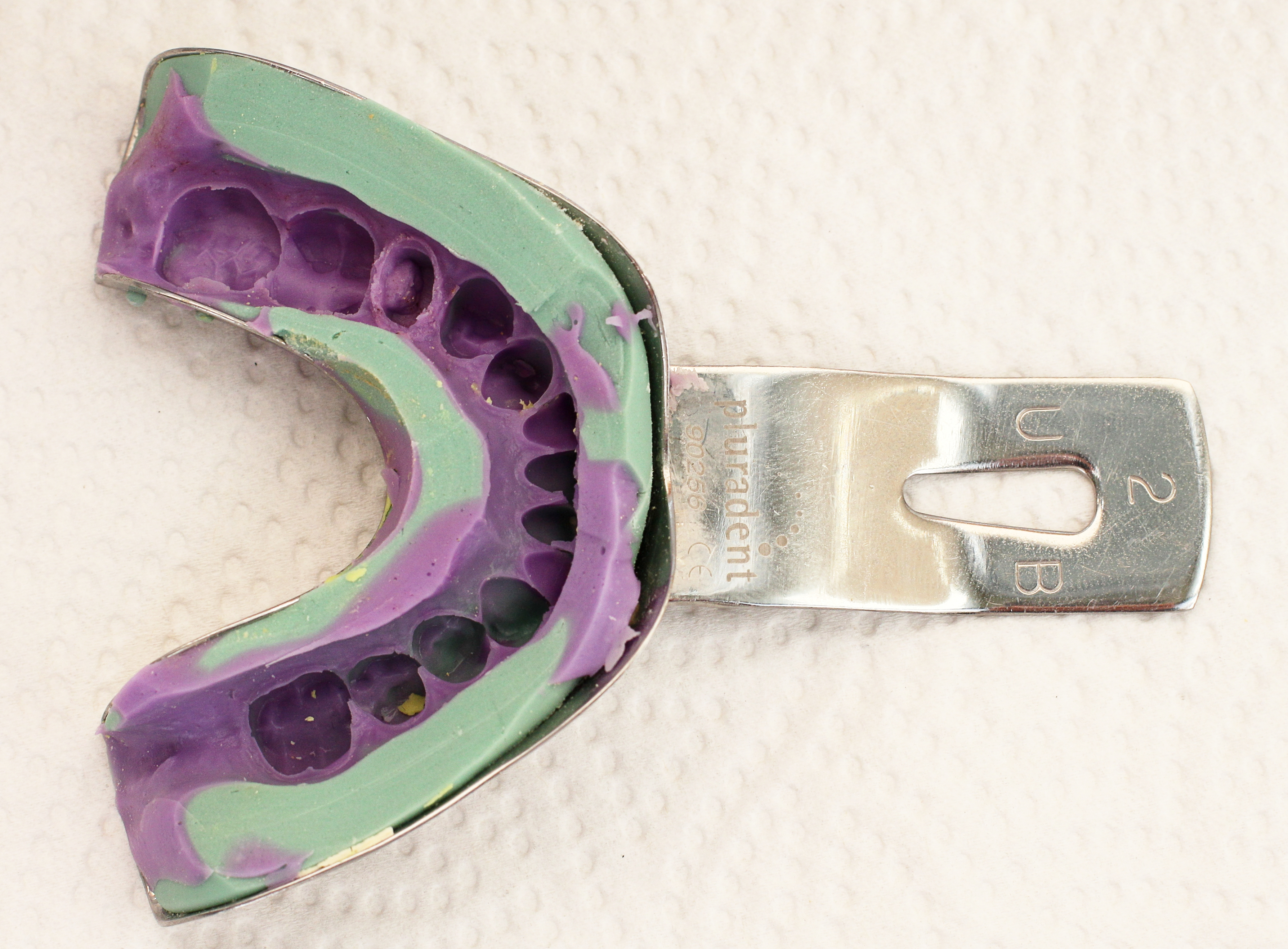 Zahnabdruck, zwei Phasen